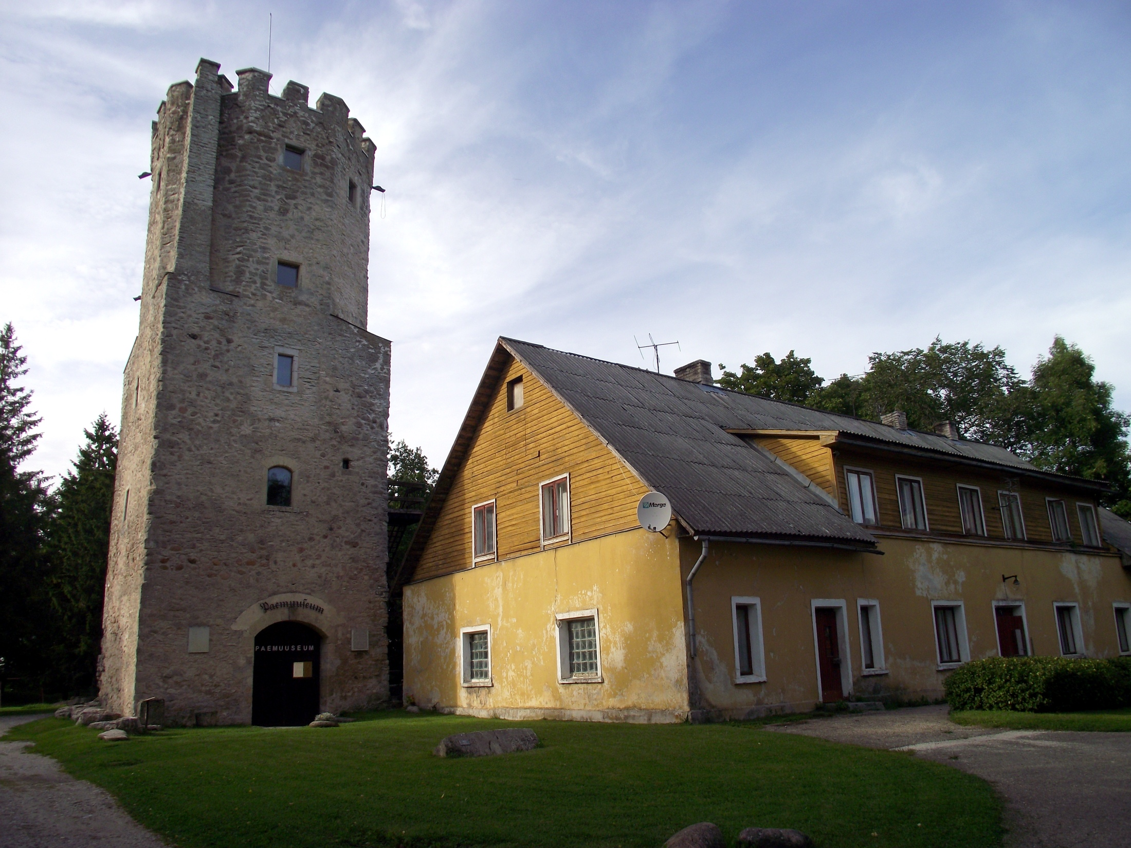 Porkuni linnuse väravatorn ja mõisa jääait